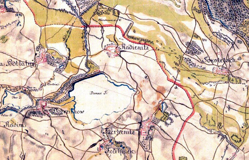 Ratenice a jejich širší okolí - I. vojenské mapování – josefské (1764–1768, 1780–1783). Měřítko 1: 28 800